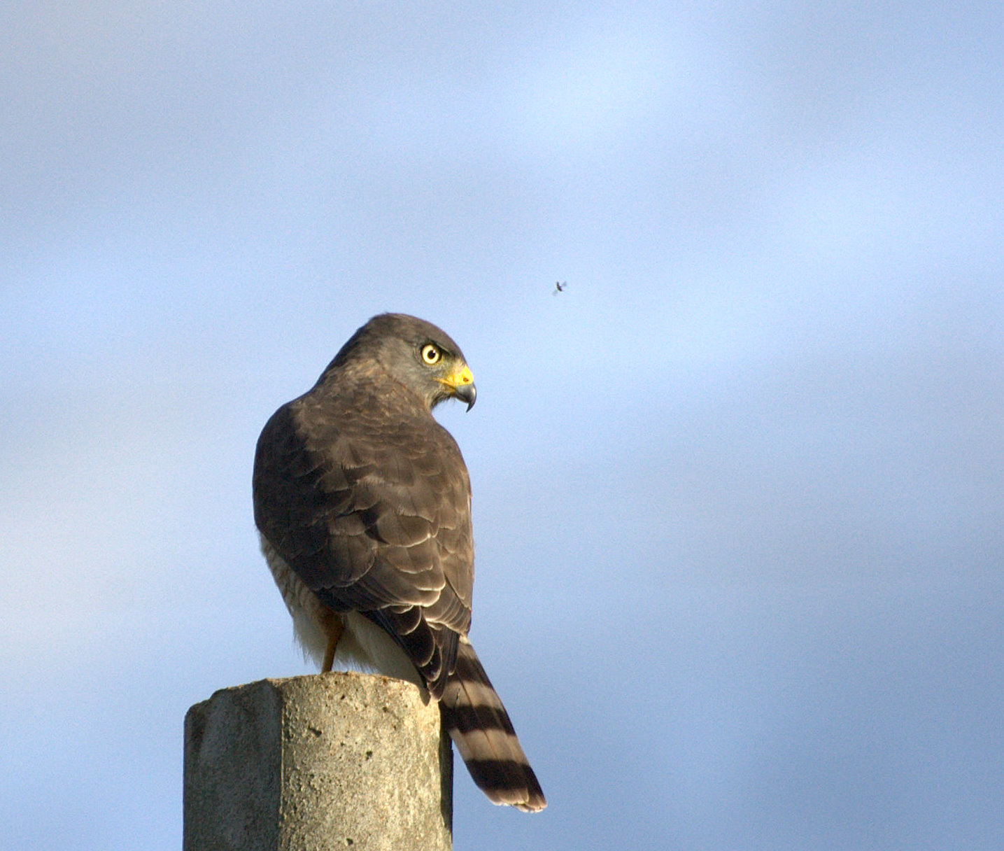 Estrada velha Piraju / Sarutaiá